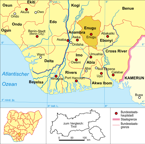 politische Karte Nigerias (Bundesstaat Enugu hervorgehoben)